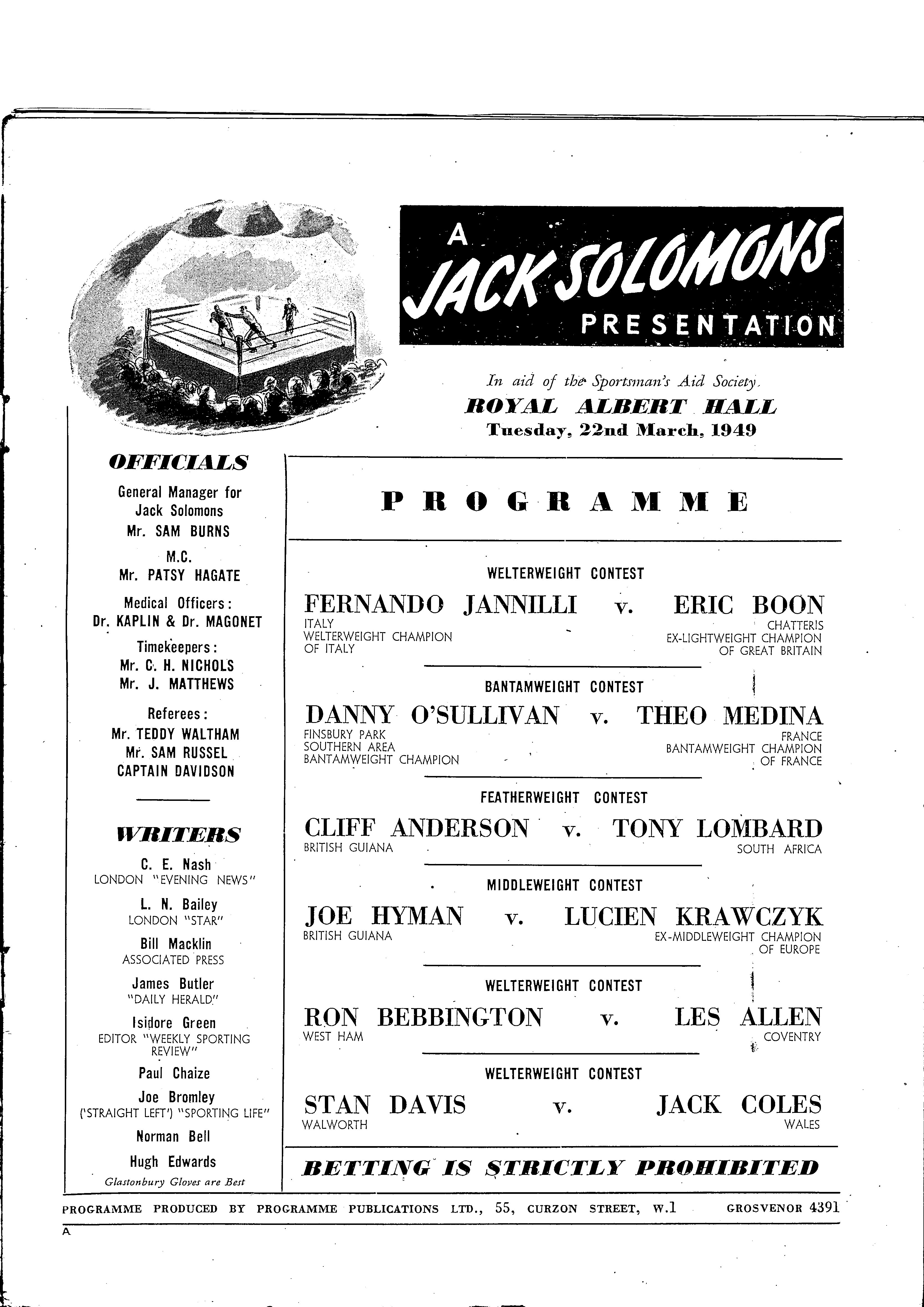 Fernando Jannilli vs Eric Boon Royal Albert Hall Londra 1949